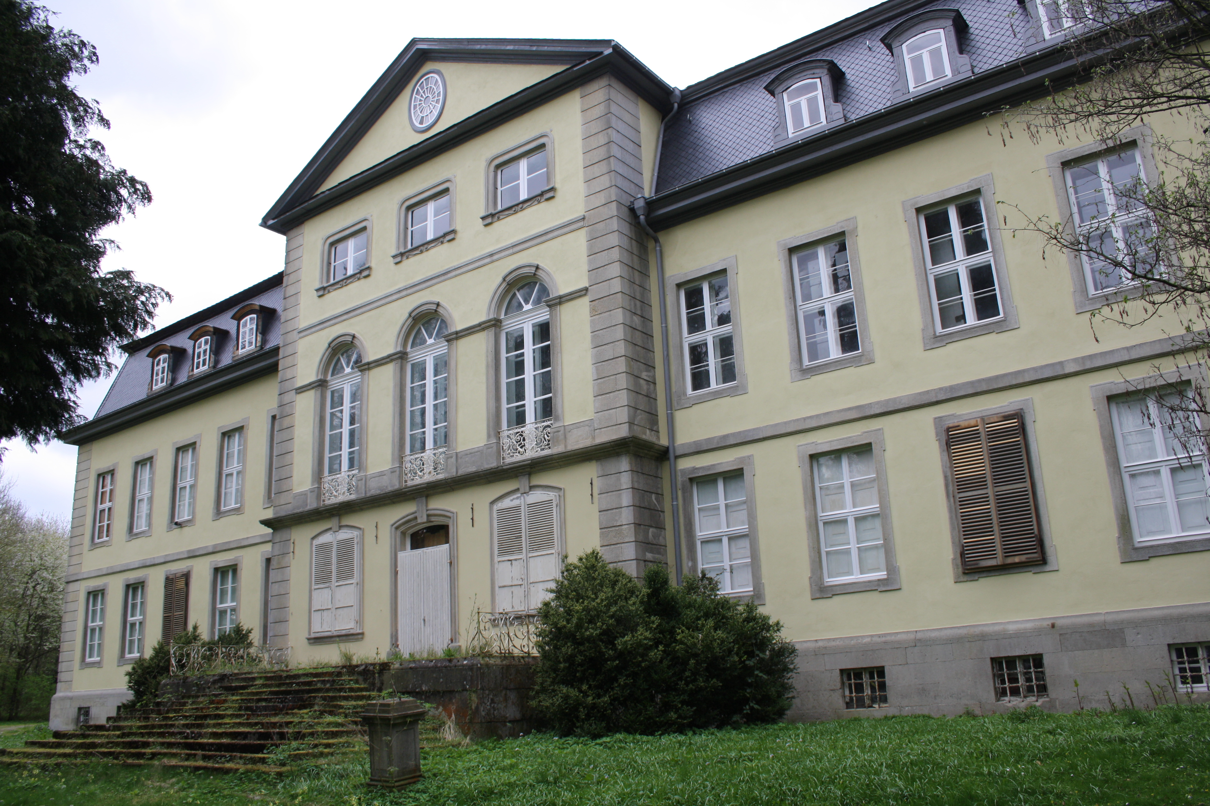 Rück- bzw. Parkansicht des Schloss Wrisbergholzen nach der Renovierung in 2016